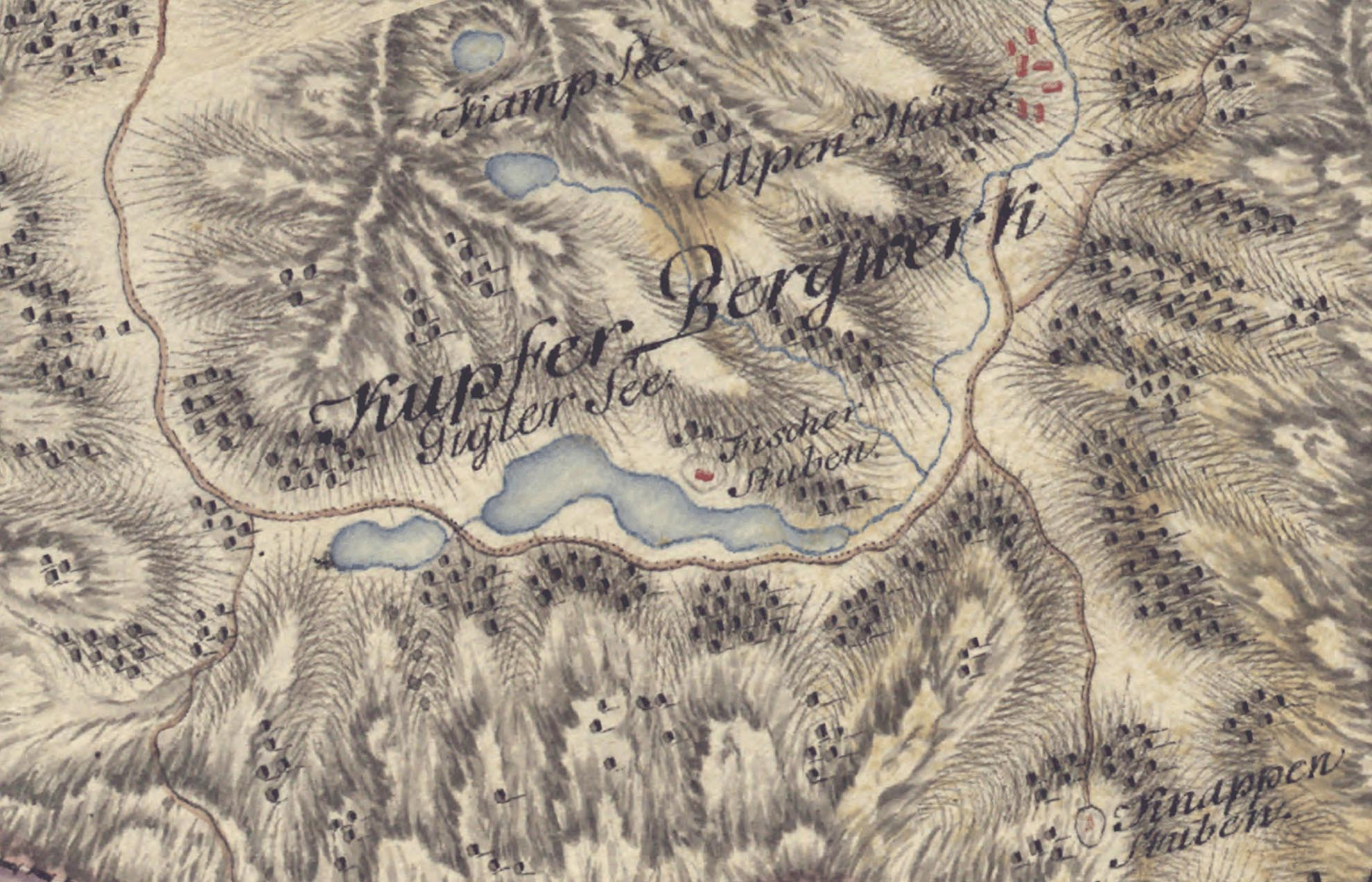 Die Giglachseen in den Schladminger Tauern in der Josephinischen Landesaufnahme